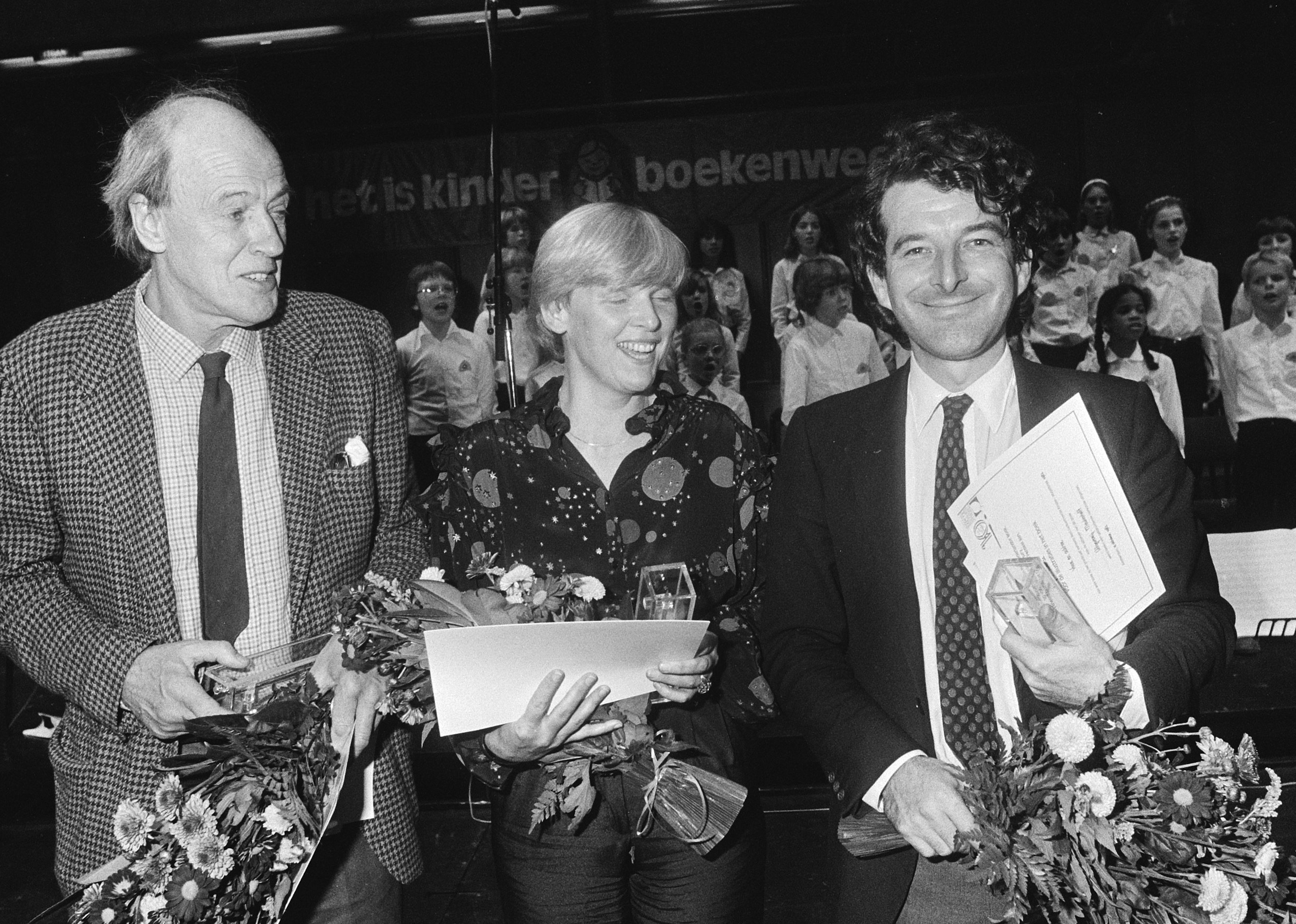 Winnaars Gouden Griffel & Gouden Penseel 1982, Utrecht 1982. Roald Dahl (Zilveren Griffel), Nannie Kuiper (Gouden Griffel), Joost Roelofsz (Gouden Penseel) foto Hans van Dijk / Anefo - National Archive (cropped´version)